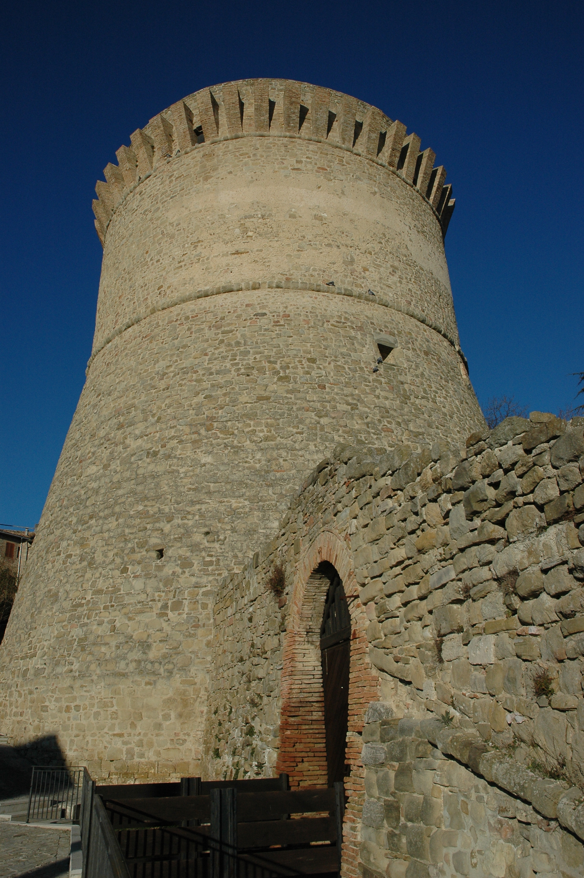 Maschio visto da Ovest